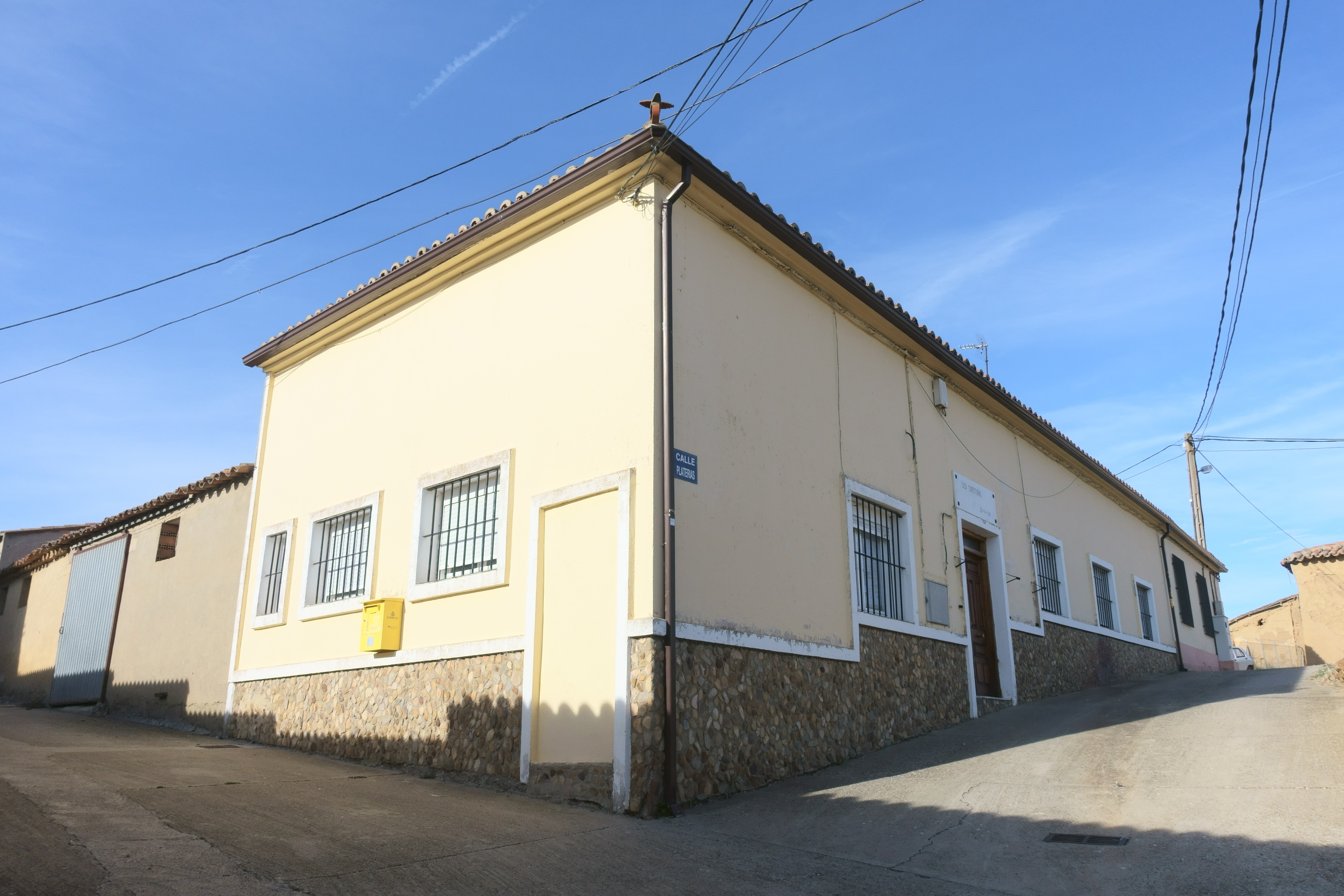 Casa consistorial de San Martín de Valderaduey (Zamora, España).